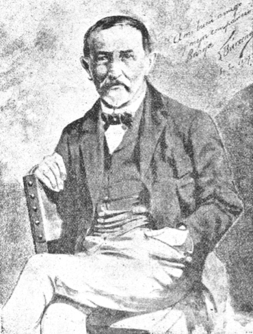 Retrato de Serafín Baroja incluido en el número 69 (segunda semana de 1913) de la revista "Euskal-Erria".